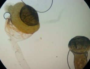 sporangium pilobolus